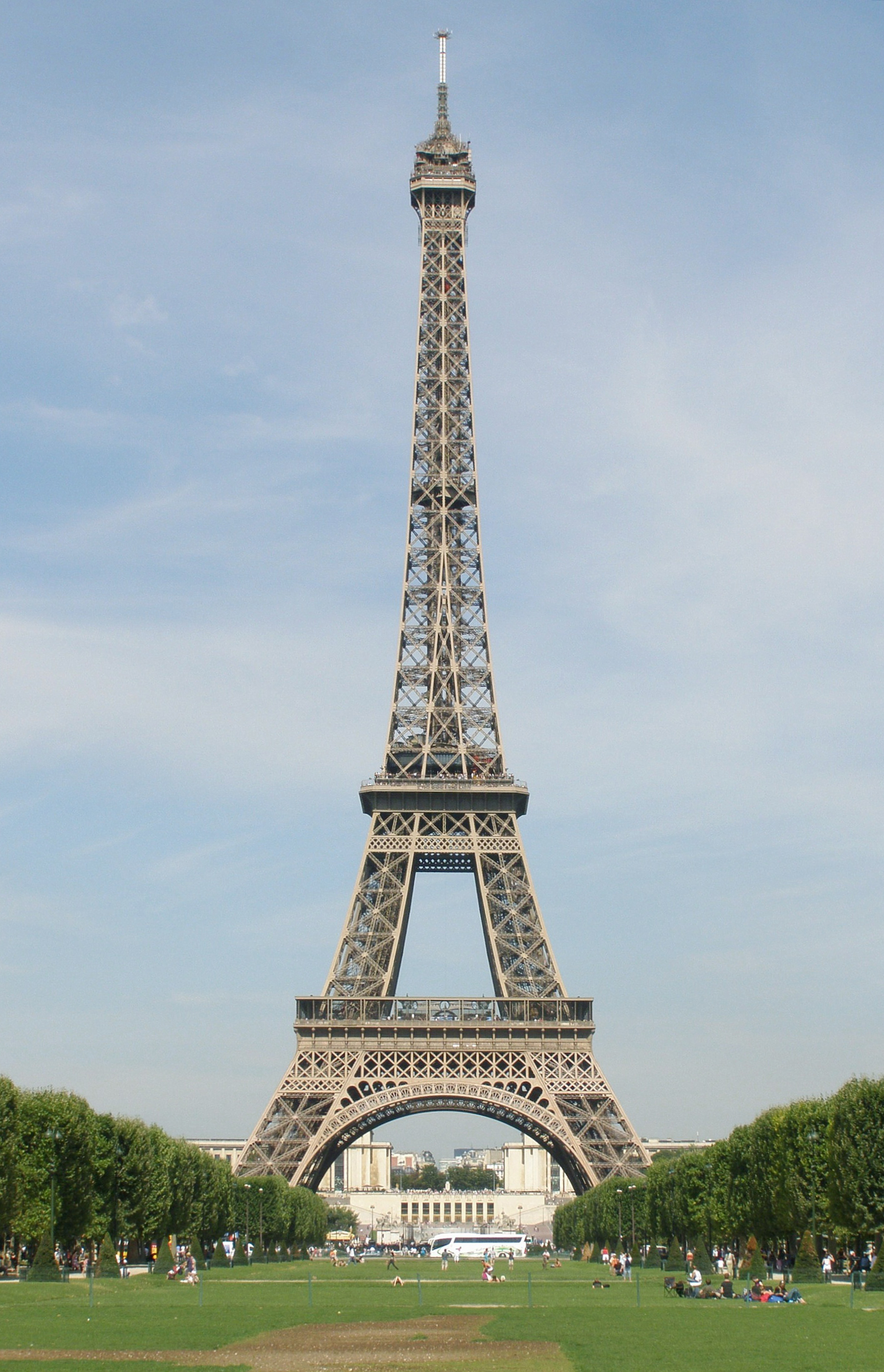 Tour Eiffel